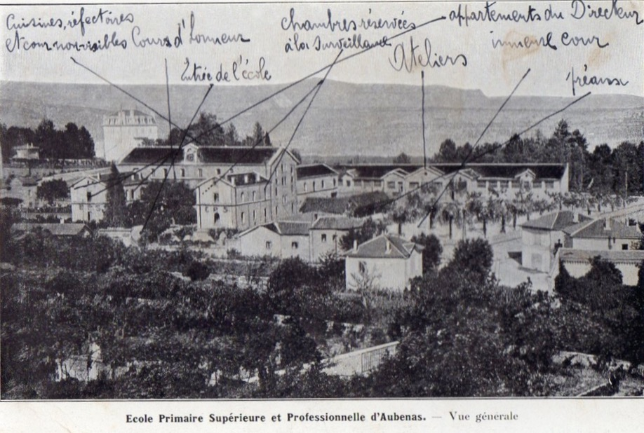 École Primaire supérieure et professionnelle d'Aubenas (Ardèche) surécrite, carte postale ancienne (non grevée de droits).